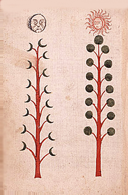 Manuscrit de Jean de Roquetaillade 1350